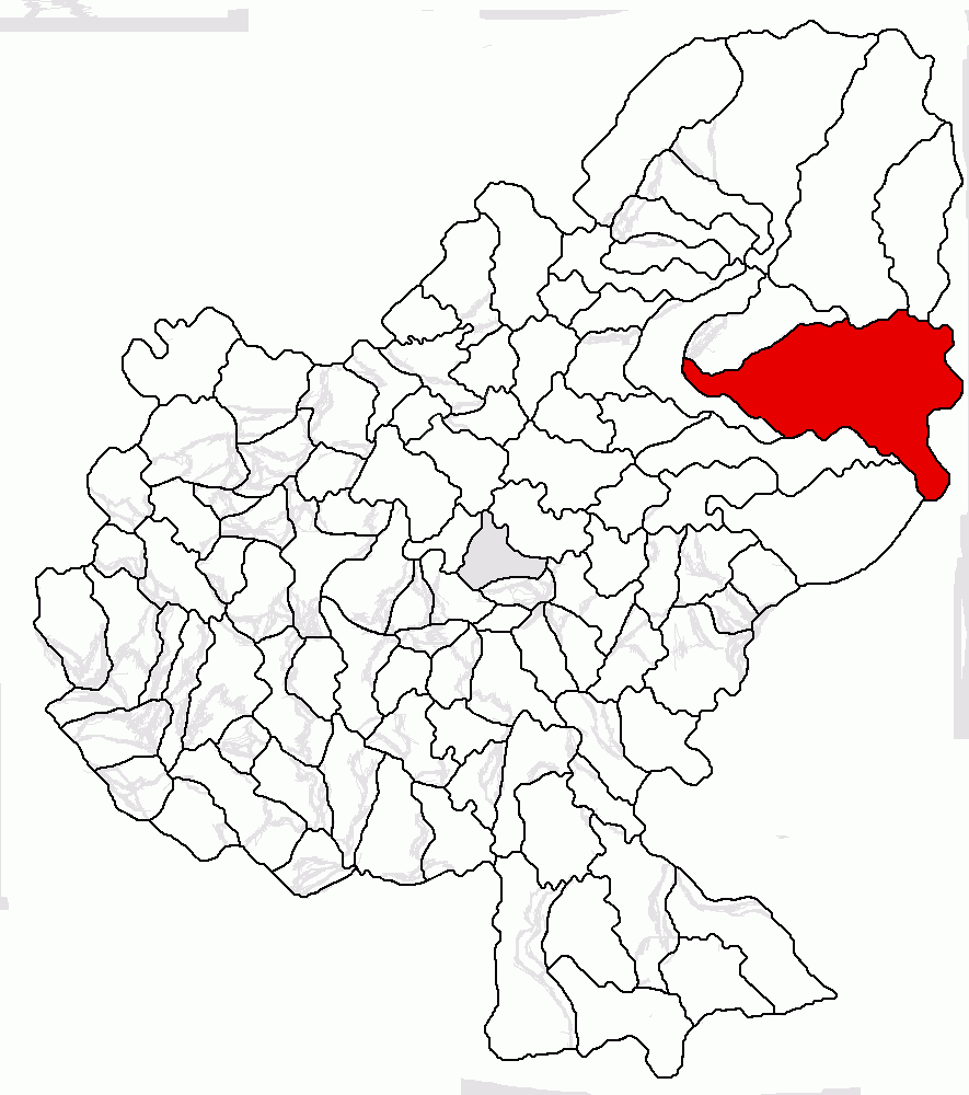 Categorie:Hărţi ale judeţului Mureş